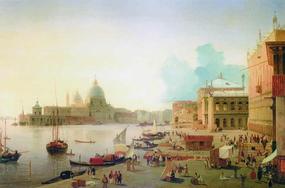 Набережная дельи Скиавони в Венеции